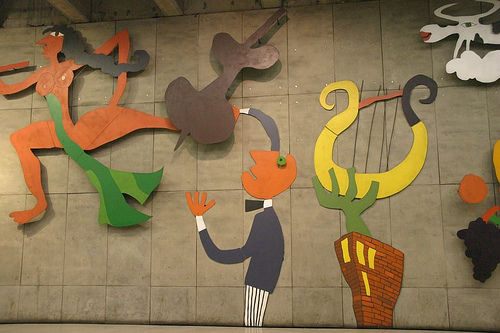 Fragmento de Declaración de amor (láminas de acero cortén recortadas y policromadas y láminas de hormigón armado, 166 m²; 1999), obra de Samy Benmayor en la estación de metro Baquedano, Santiago de Chile.